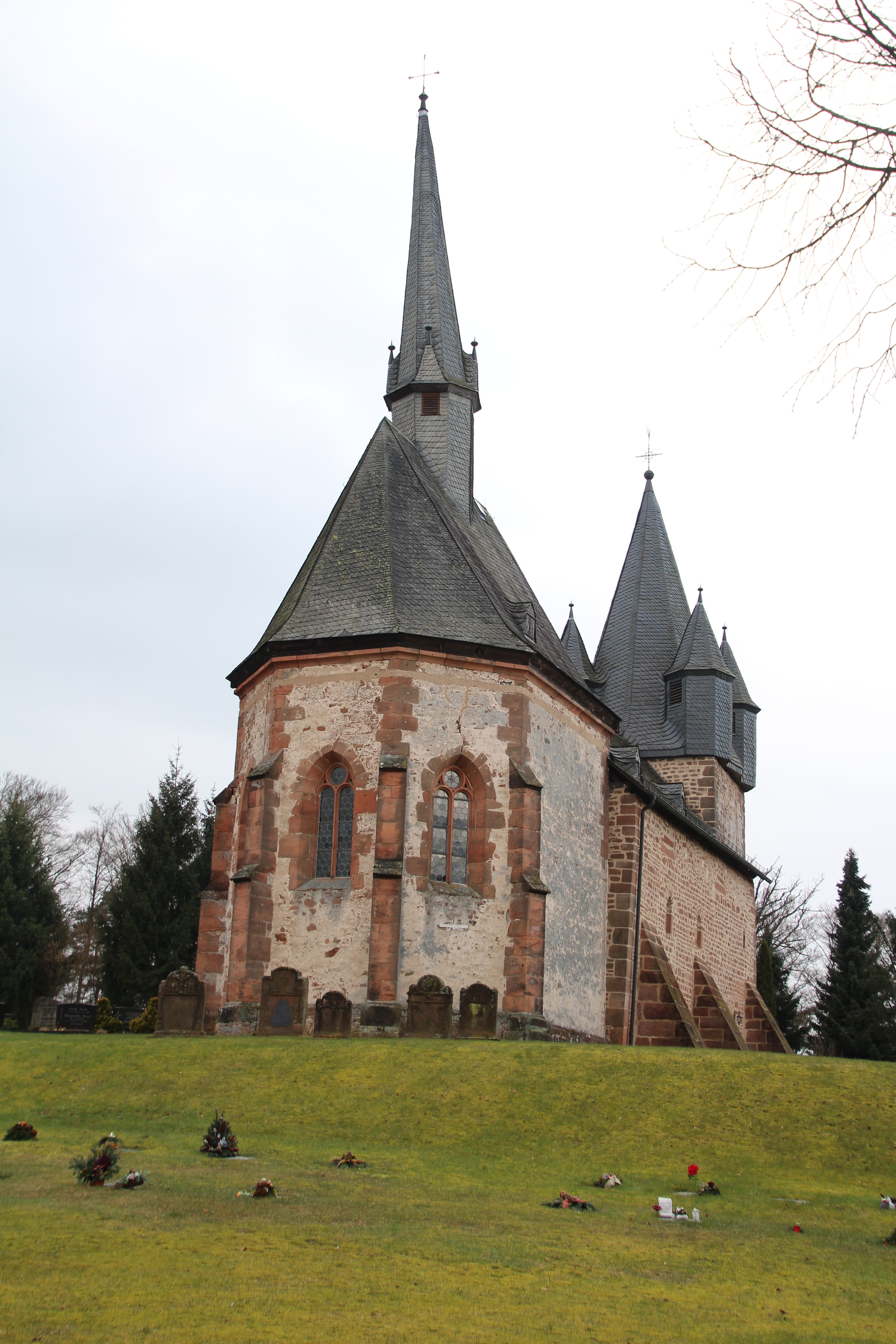 Christenberg